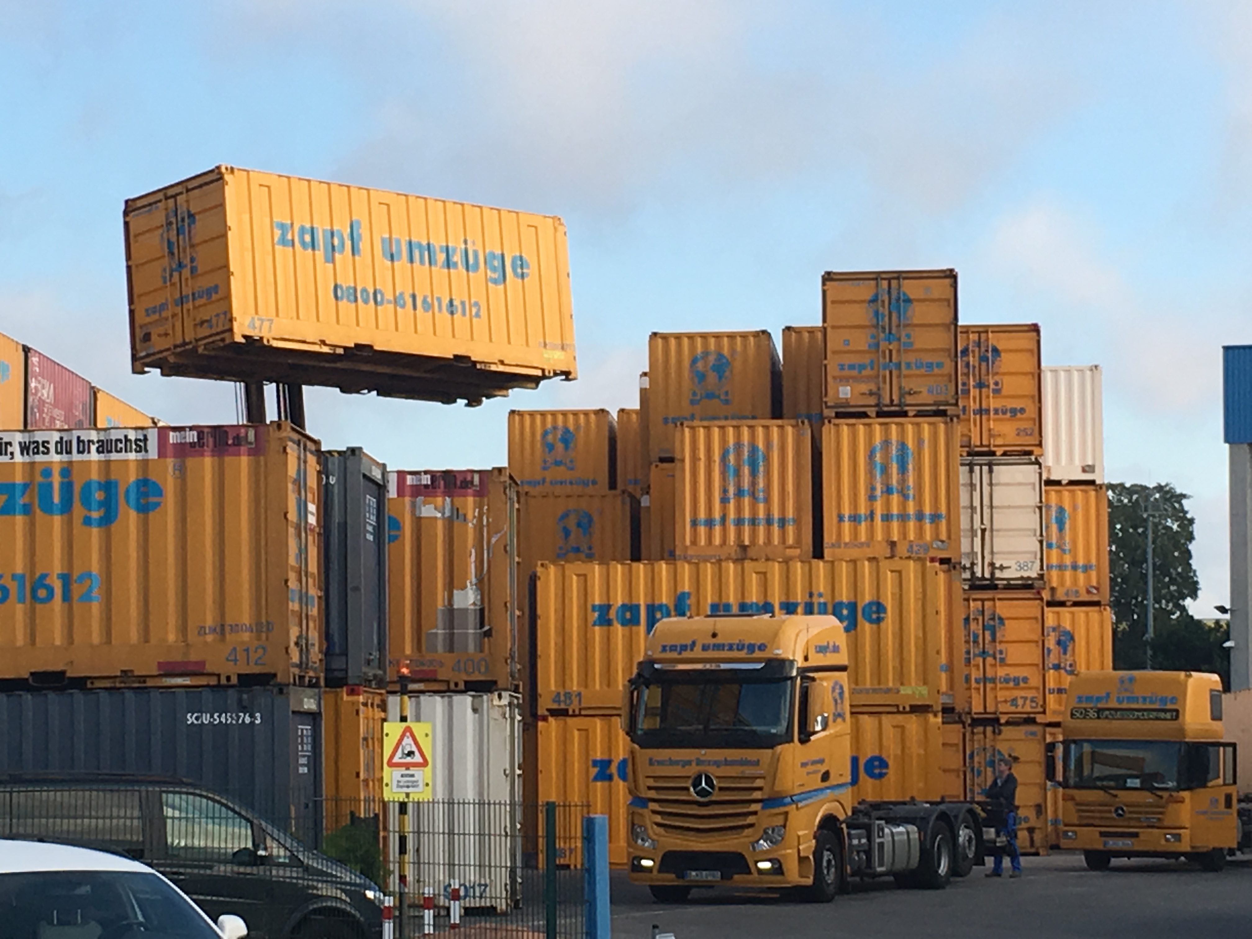 zapf umzüge AG, 1975 gegründete internationale Umzugsfachspedition mit Sitz in Berlin und Filialen in sieben weiteren Städten. Container in der Zentrale Berlin.